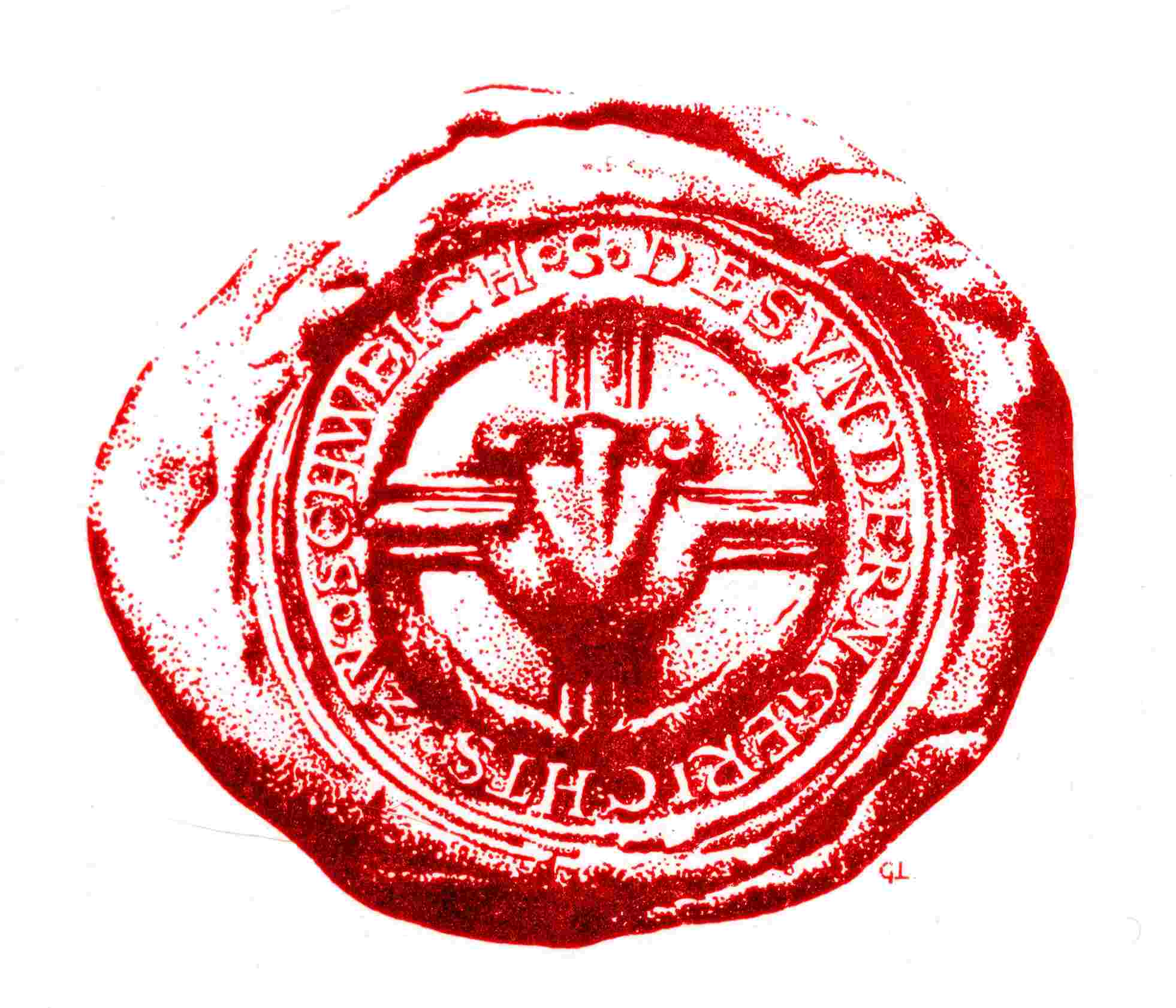 Das Gerichtssiegel der Schultheißerei Schweich von 1608 trägt die Umschrift: S. DES VNDERNGERICHTS ZW SCHWEICH, vgl. Artur Gemmel, Chronik von Schweich, 1984.